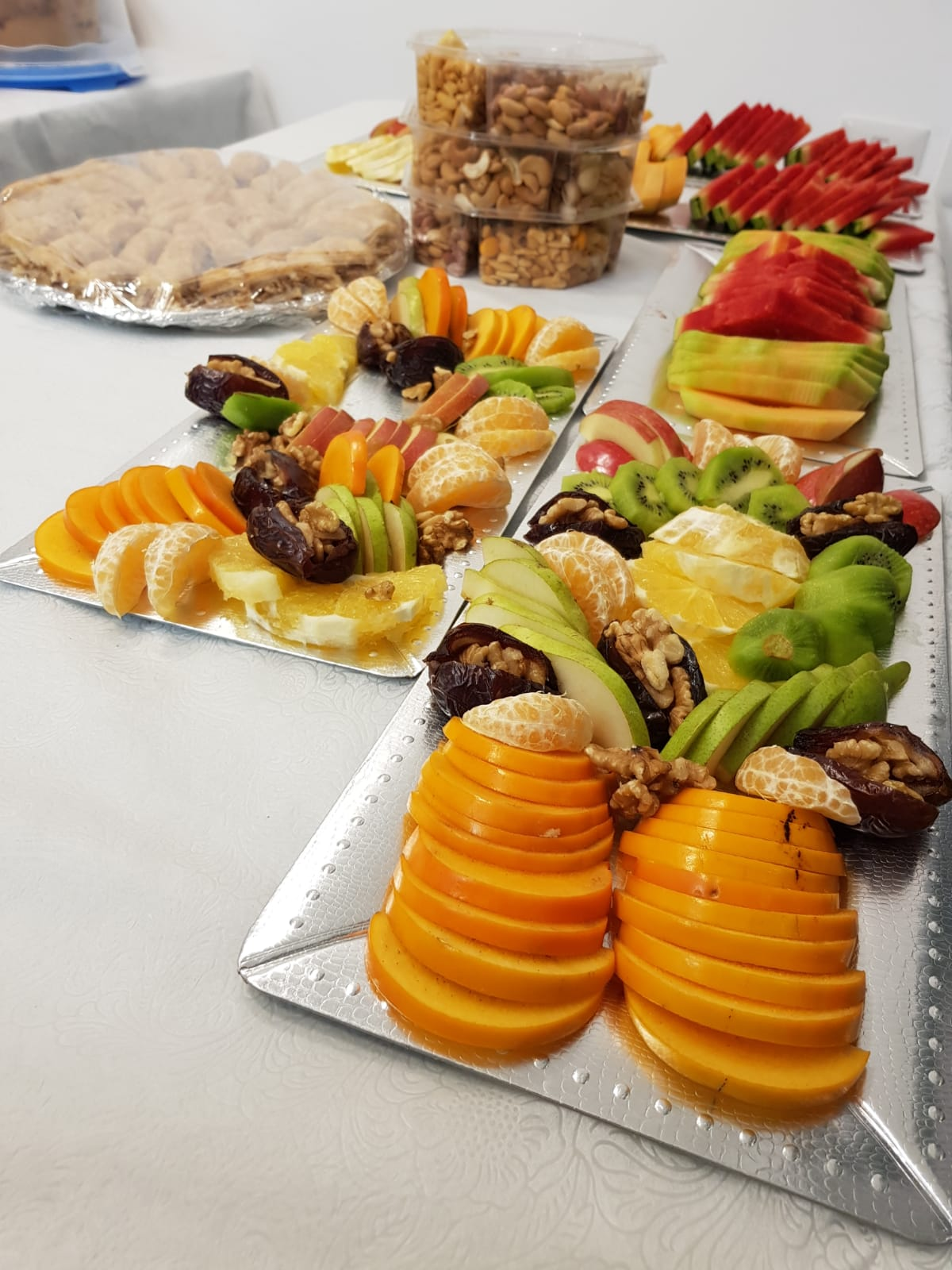 פירות במגוון צבעוני ומיוחד,חתוך